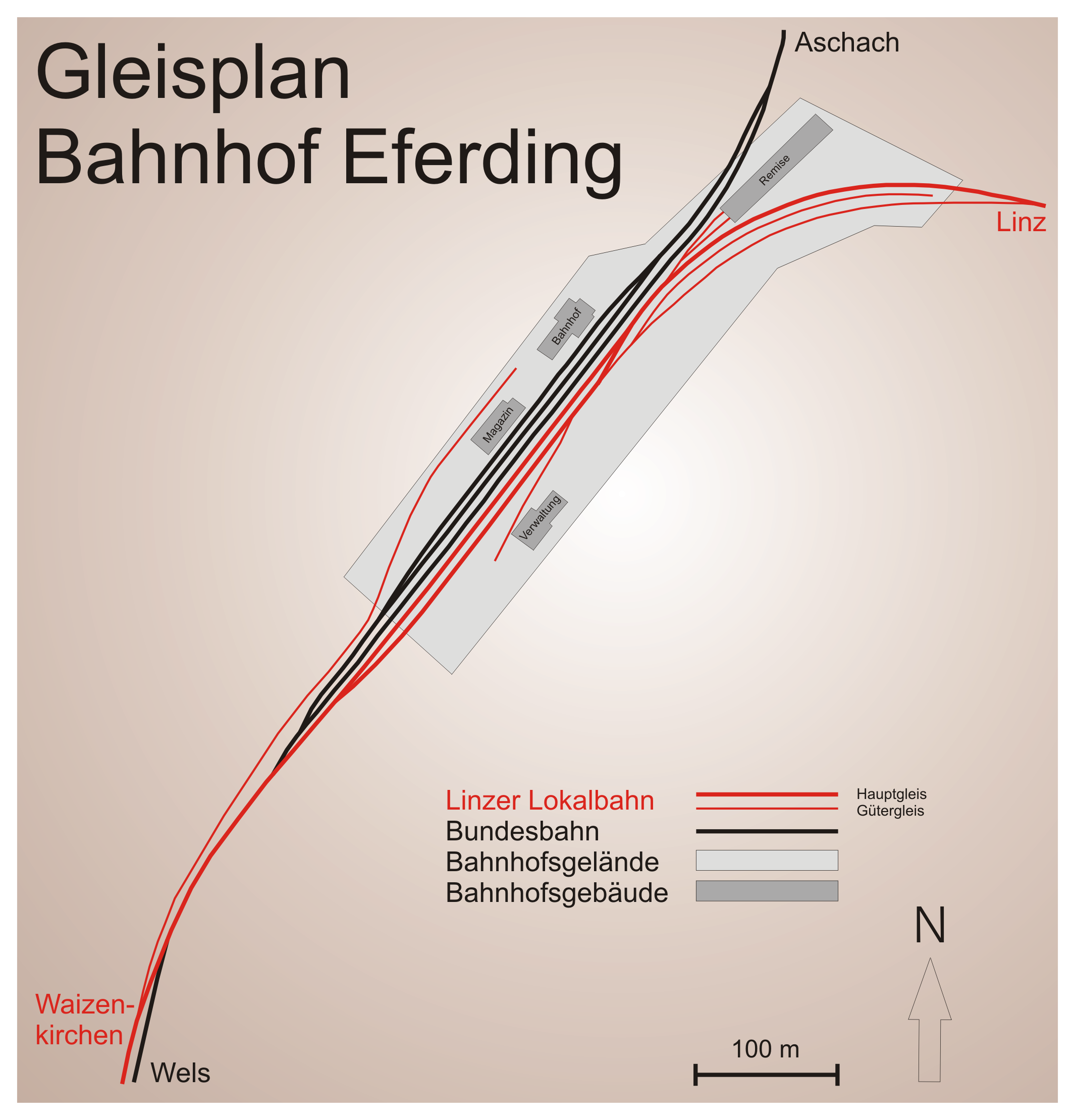 Gleisplan Kreuzungsbahnhof Eferding der Linzer Lokalbahn mit ÖBB 2007